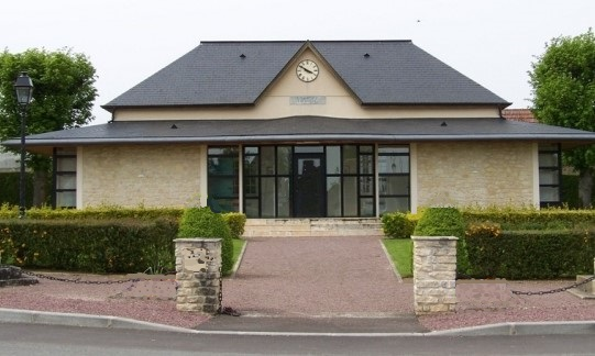 Mairie de Champenard